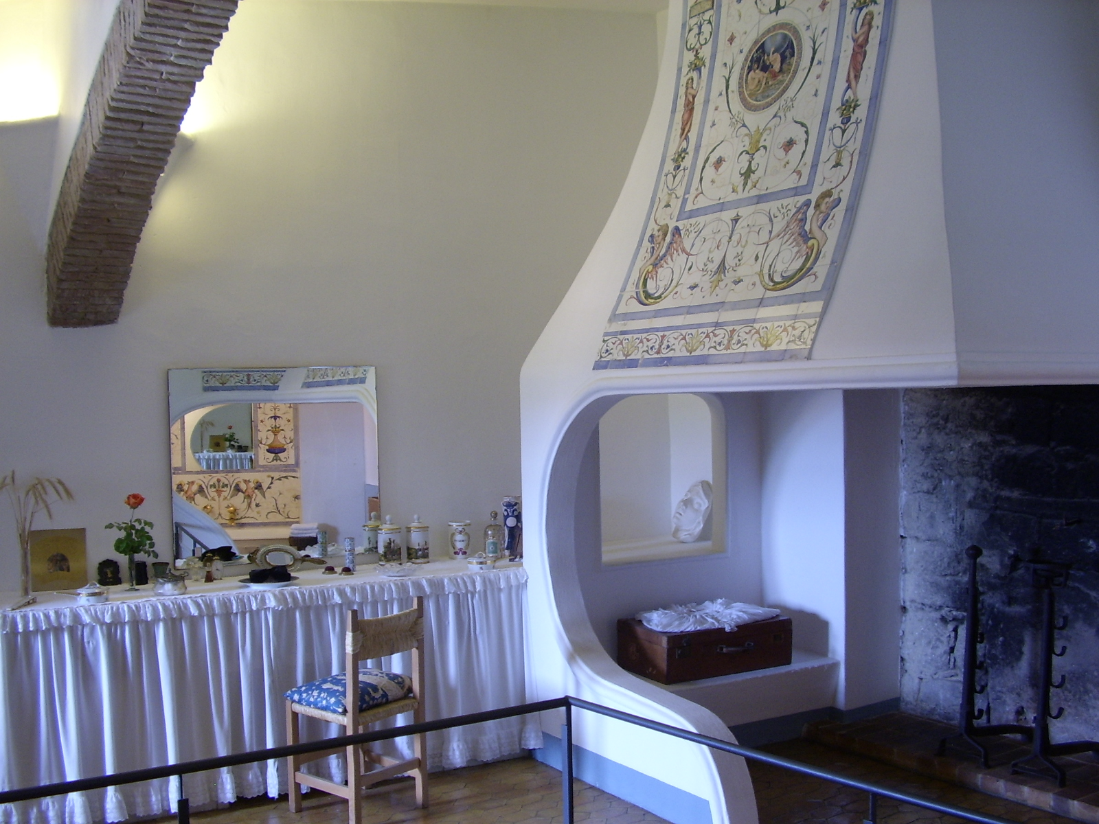 Salvador Dalí's house in Cadaques